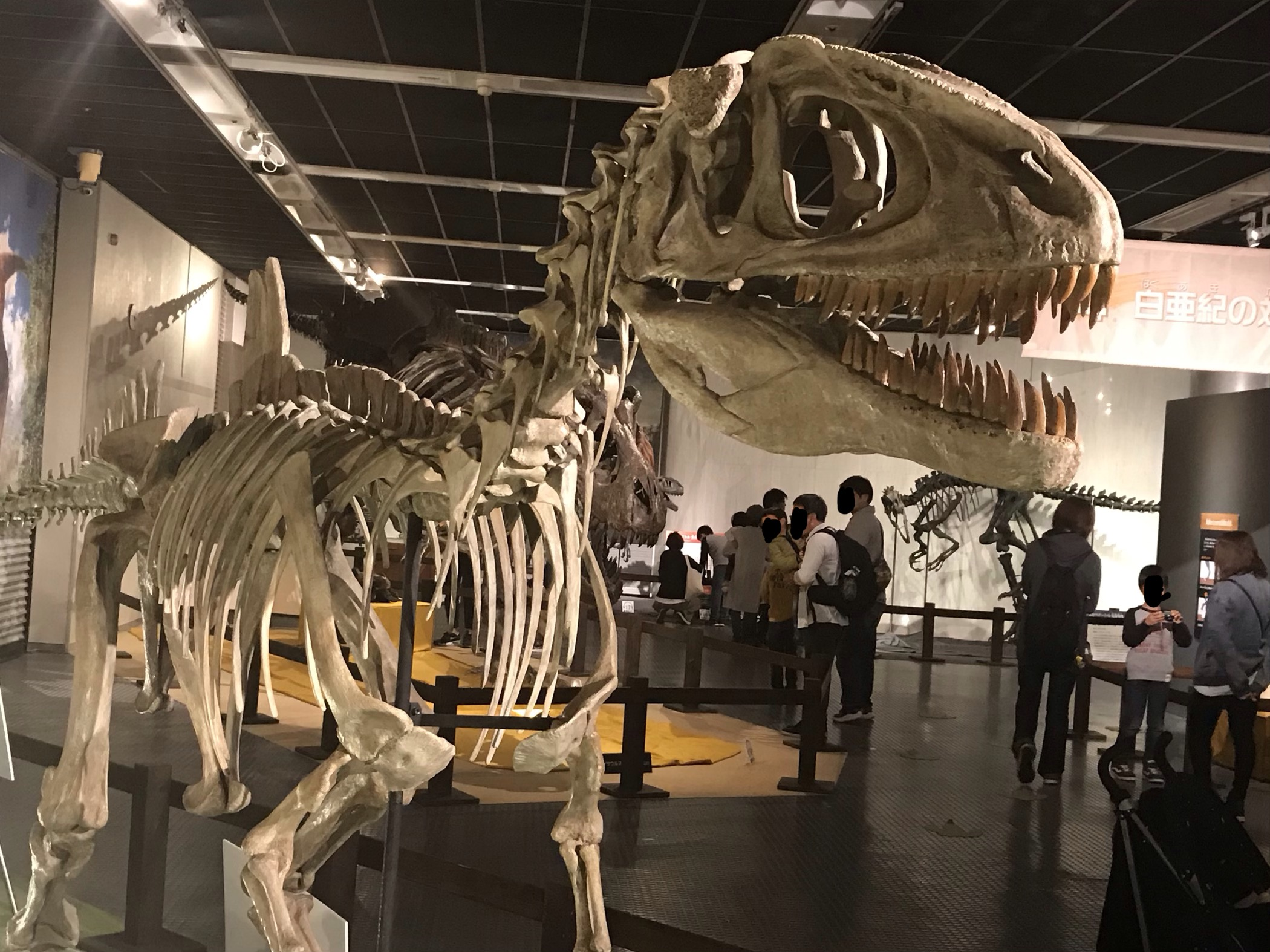 コンカヴェナトル復元骨格